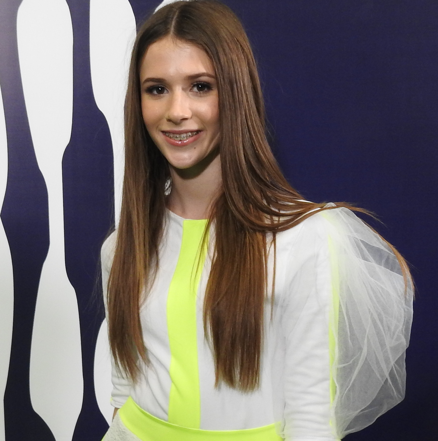 Polska piosenkarka Roksana Węgiel podczas 16. Konkursu Piosenki Eurowizji dla Dzieci w Mińsku, 23 listopada 2018.